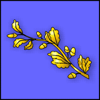 comte membre du college électoral